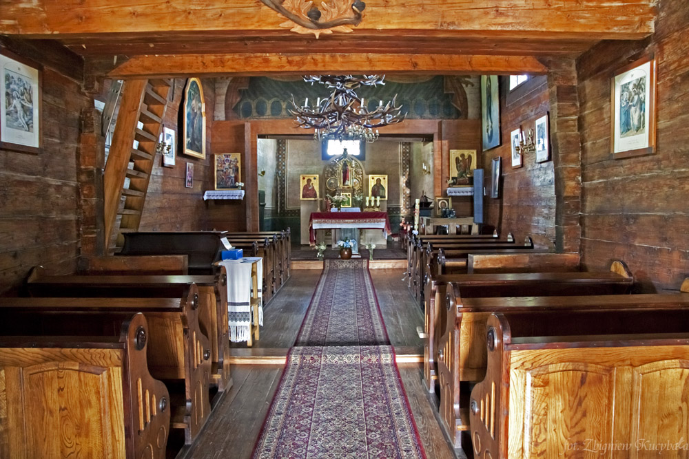 Cerkiew w Smolniku -w nętrze